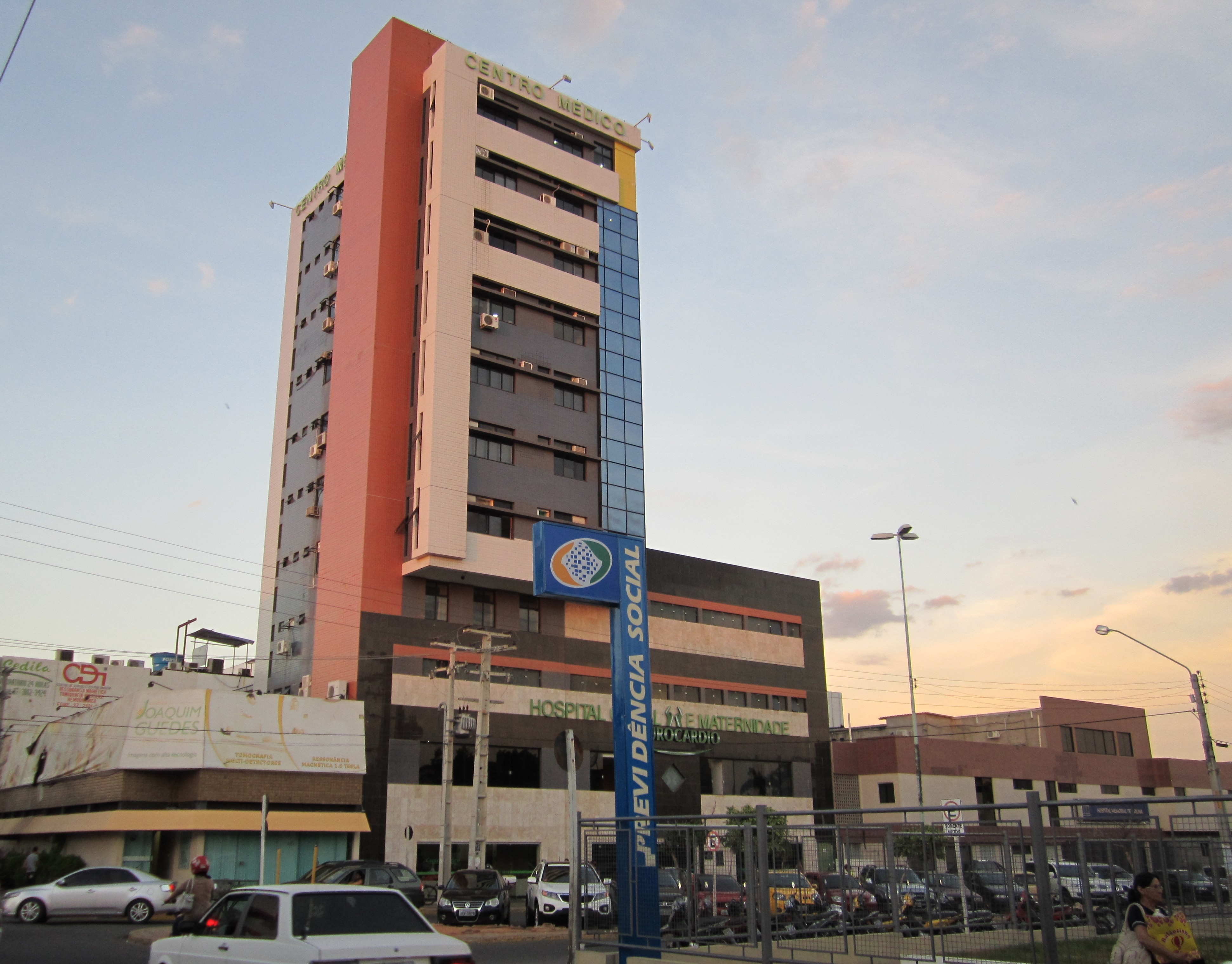 Hospital Neurocárdio - Petrolina, Pernambuco, Brasil.